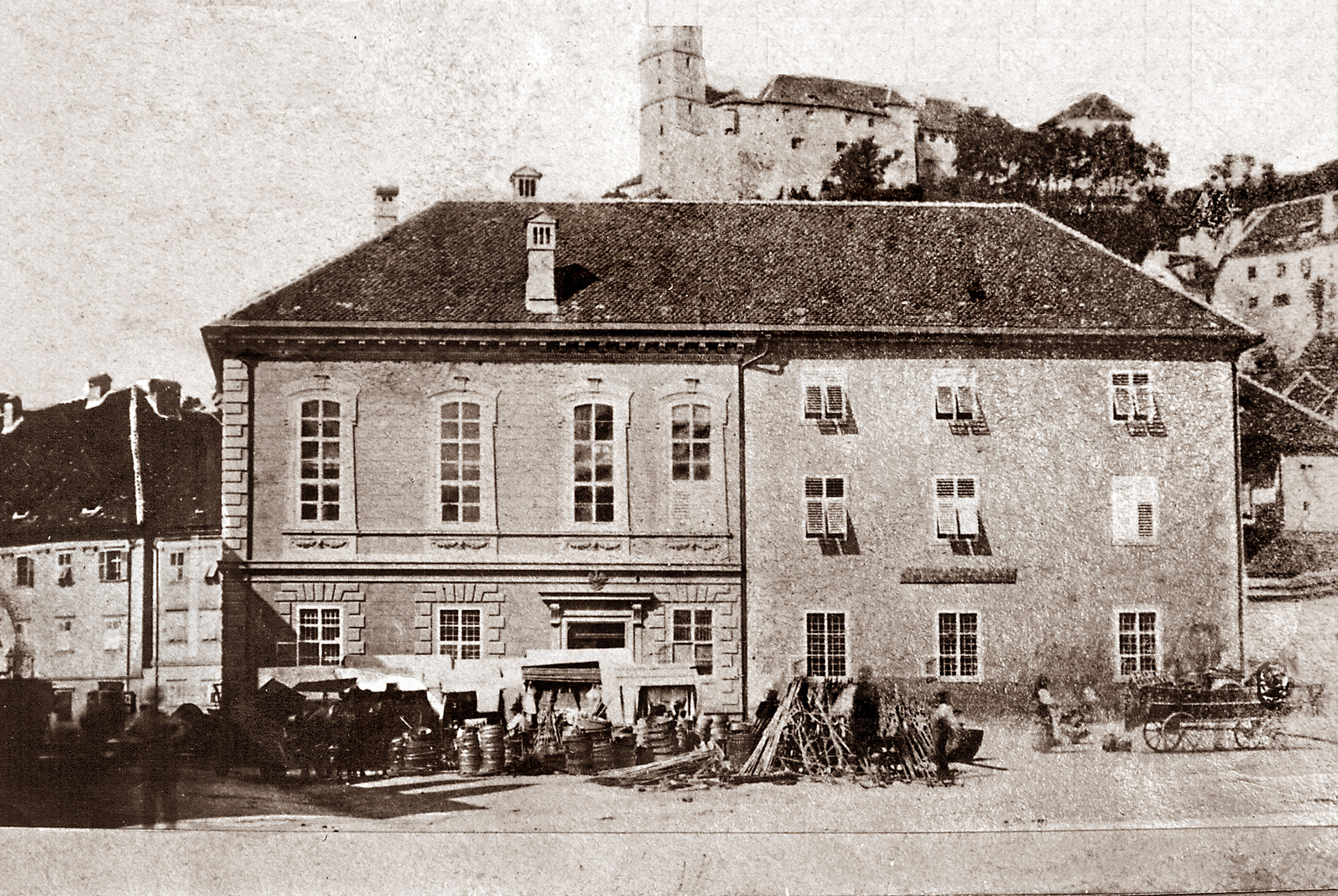 Reduta na Levstikovem trgu 1 in pred njo prodaja slamnikov, leto 1890